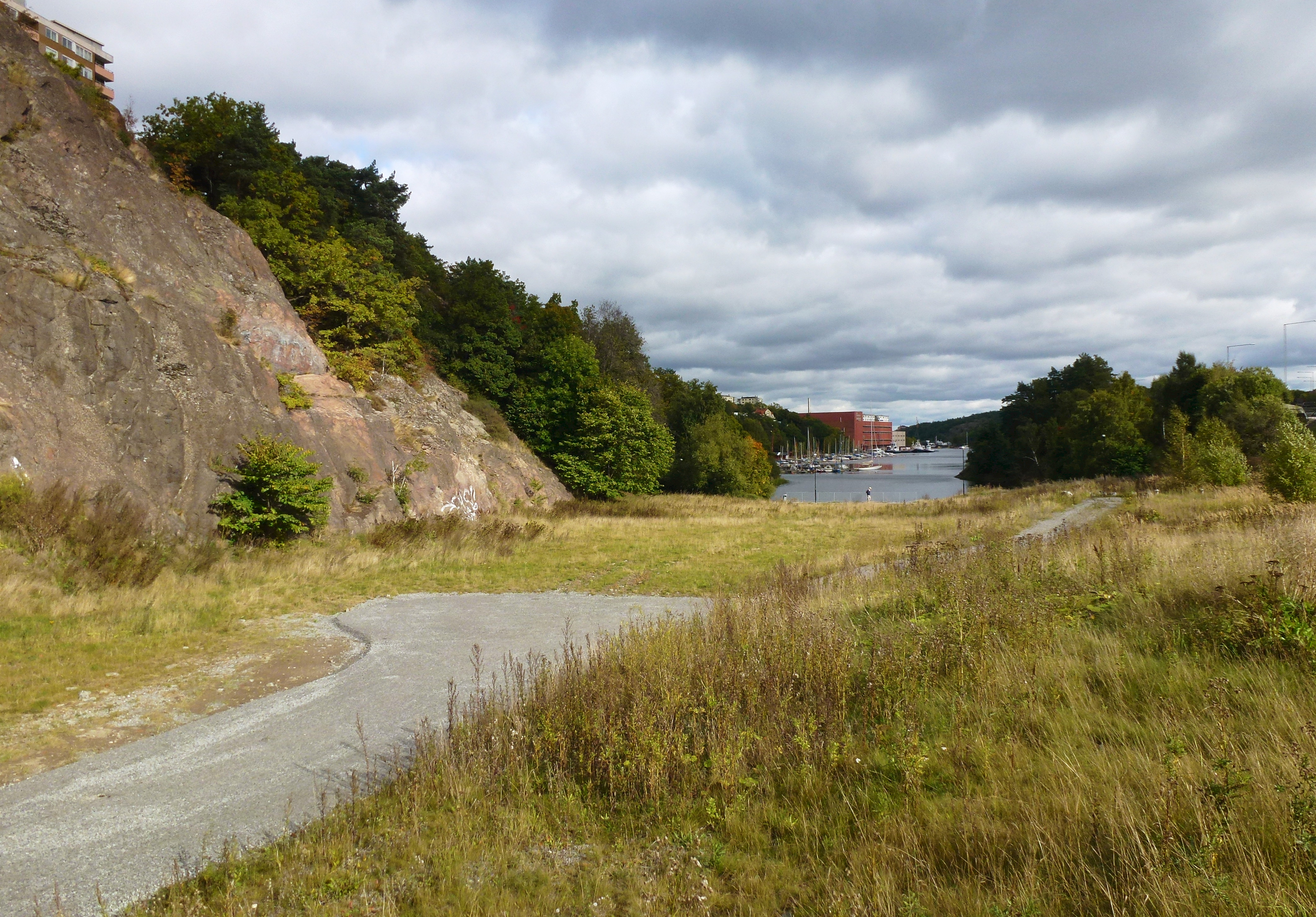 Svindersviken, Dockans f.d. oljedepå